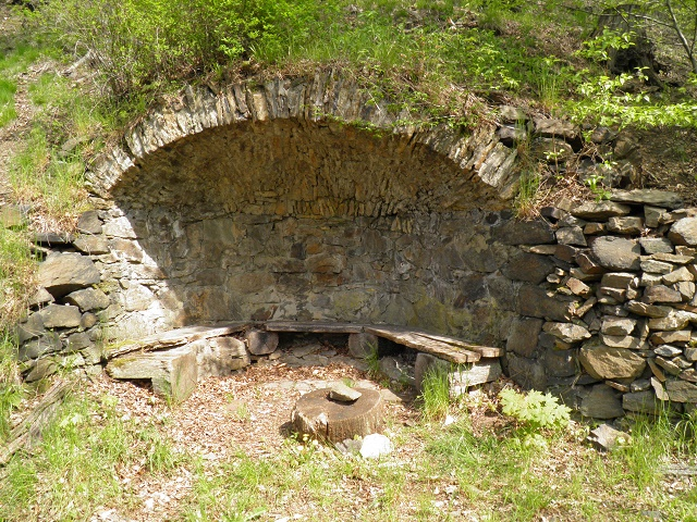 Grotte im Kurpark des ehem. Sanatoriums Sanitas, heute Rathaus, in Tharandt